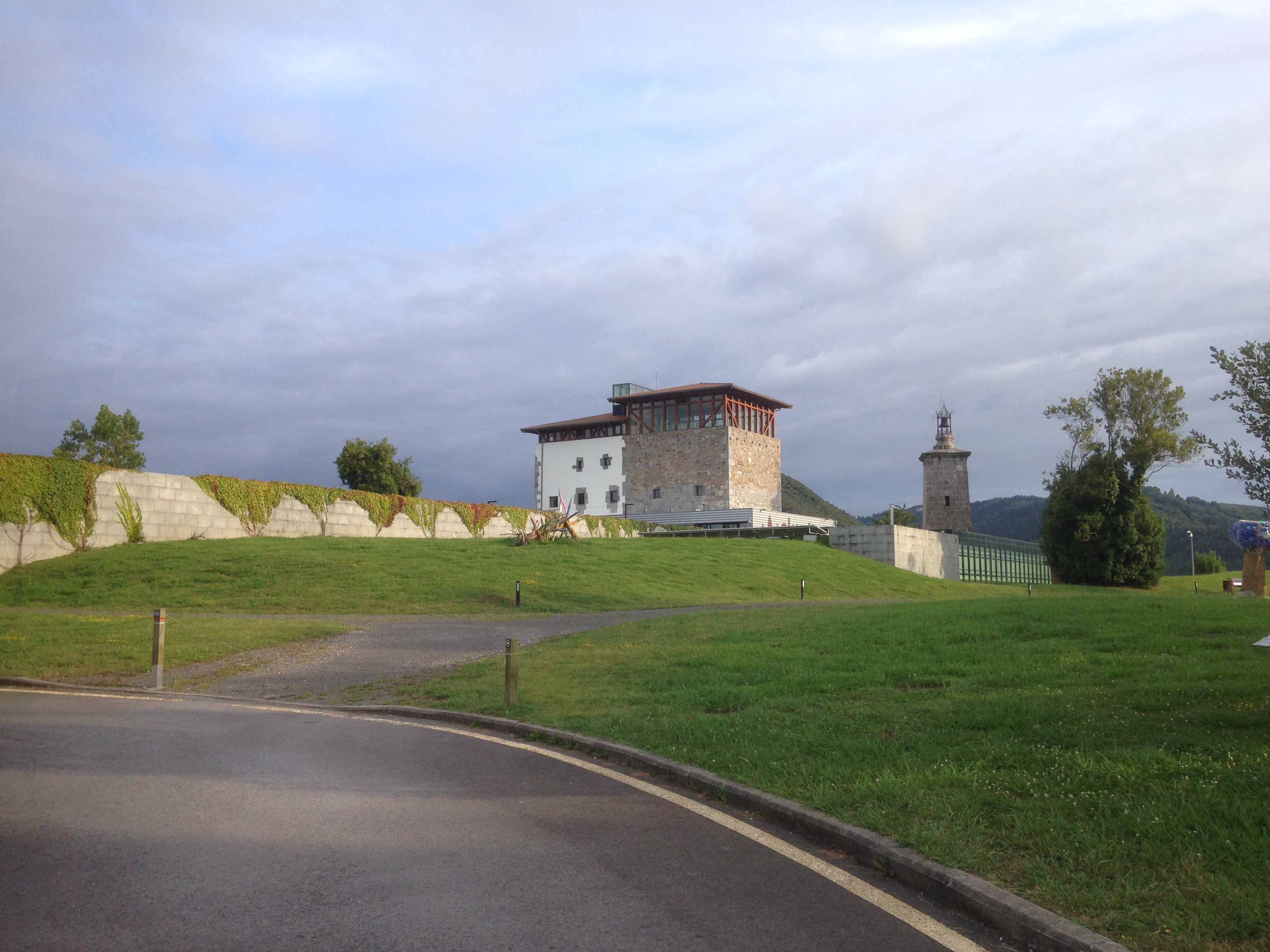 Ekoetxea Urdaibai está gestionado por Ihobe, Sociedad Pública de Gestión Ambiental del Gobierno Vasco. La sociedad pública Ihobe tiene como misión apoyar al Departamento de Medio Ambiente y Política Territorial del Gobierno Vasco en el desarrollo de la política ambiental y en la extensión de la cultura de la sostenibilidad ambiental en la Comunidad Autónoma del País Vasco. Ocupa la Torre Madariaga de la localidad vizcaina de Busturia en el País Vasco, España.